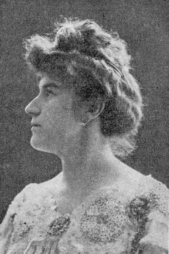 Gärtnerová Marie, česká operní pěvkyně, tanečnice, hudební pedagožka a profesorka